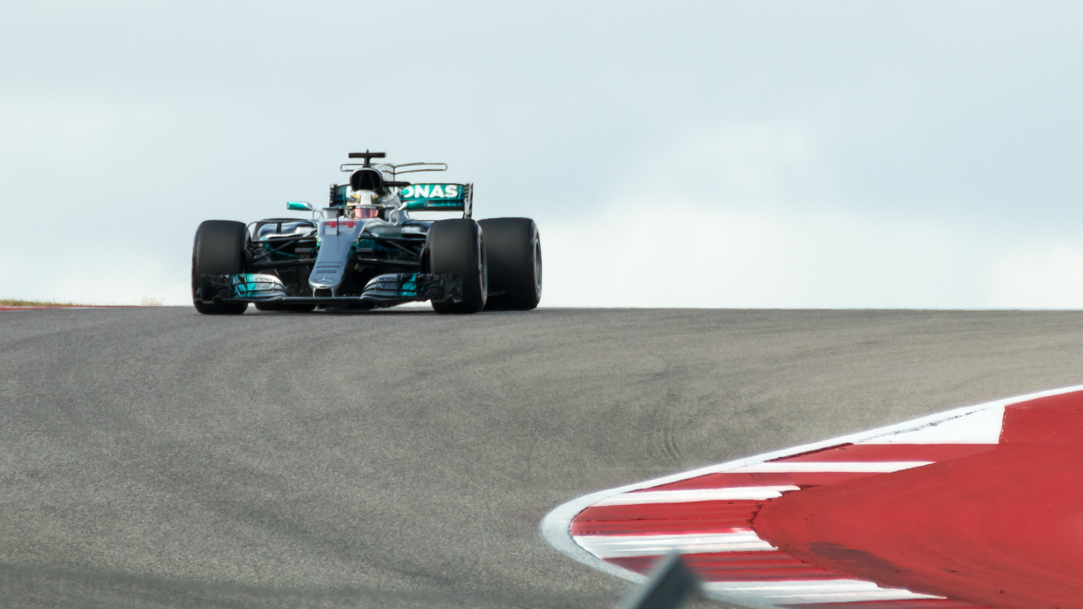 2017 USGP FP3-4.jpg